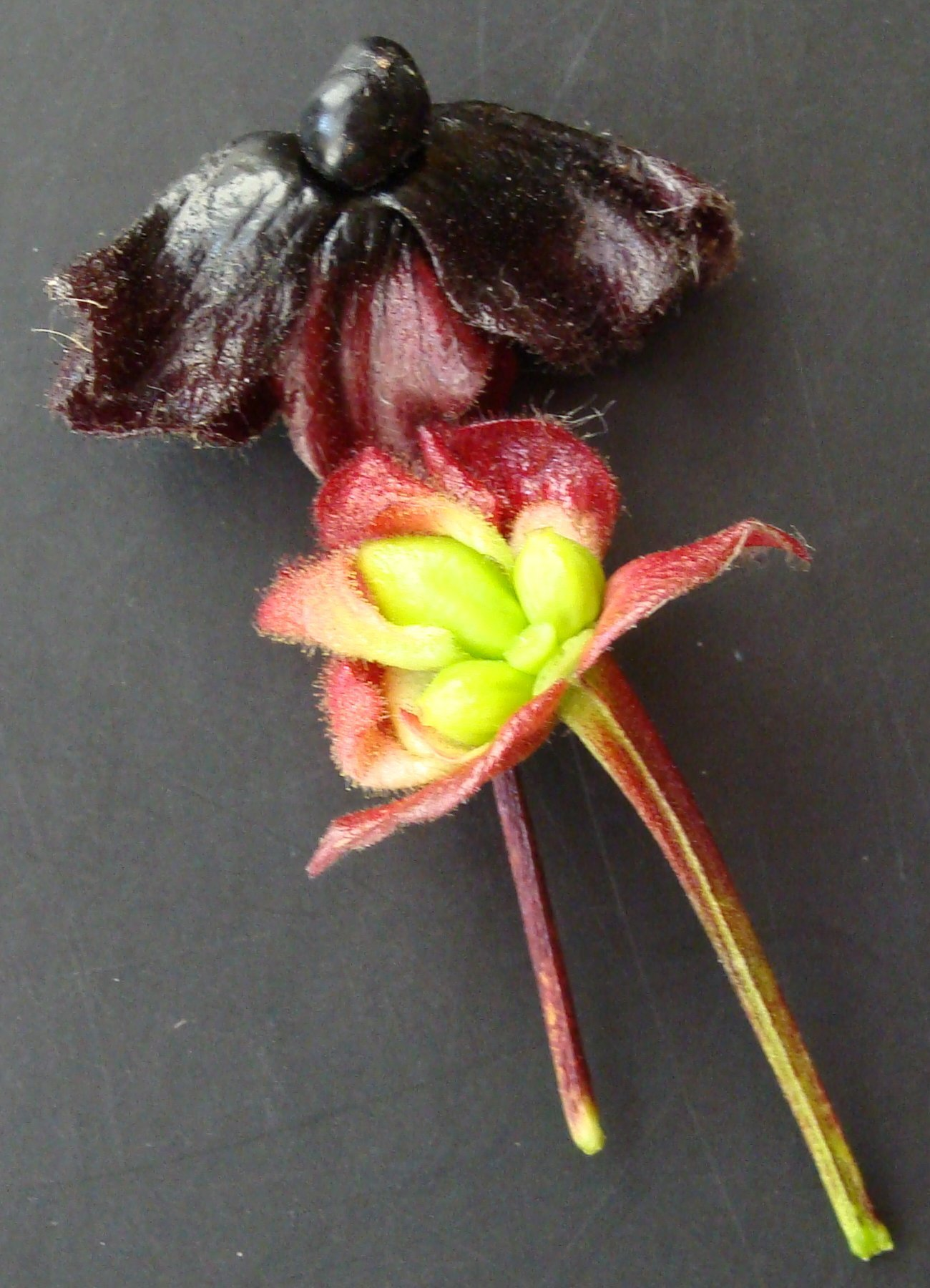 Owoc dojrzały i przekrój niedojrzałego Lonicera ledebouri